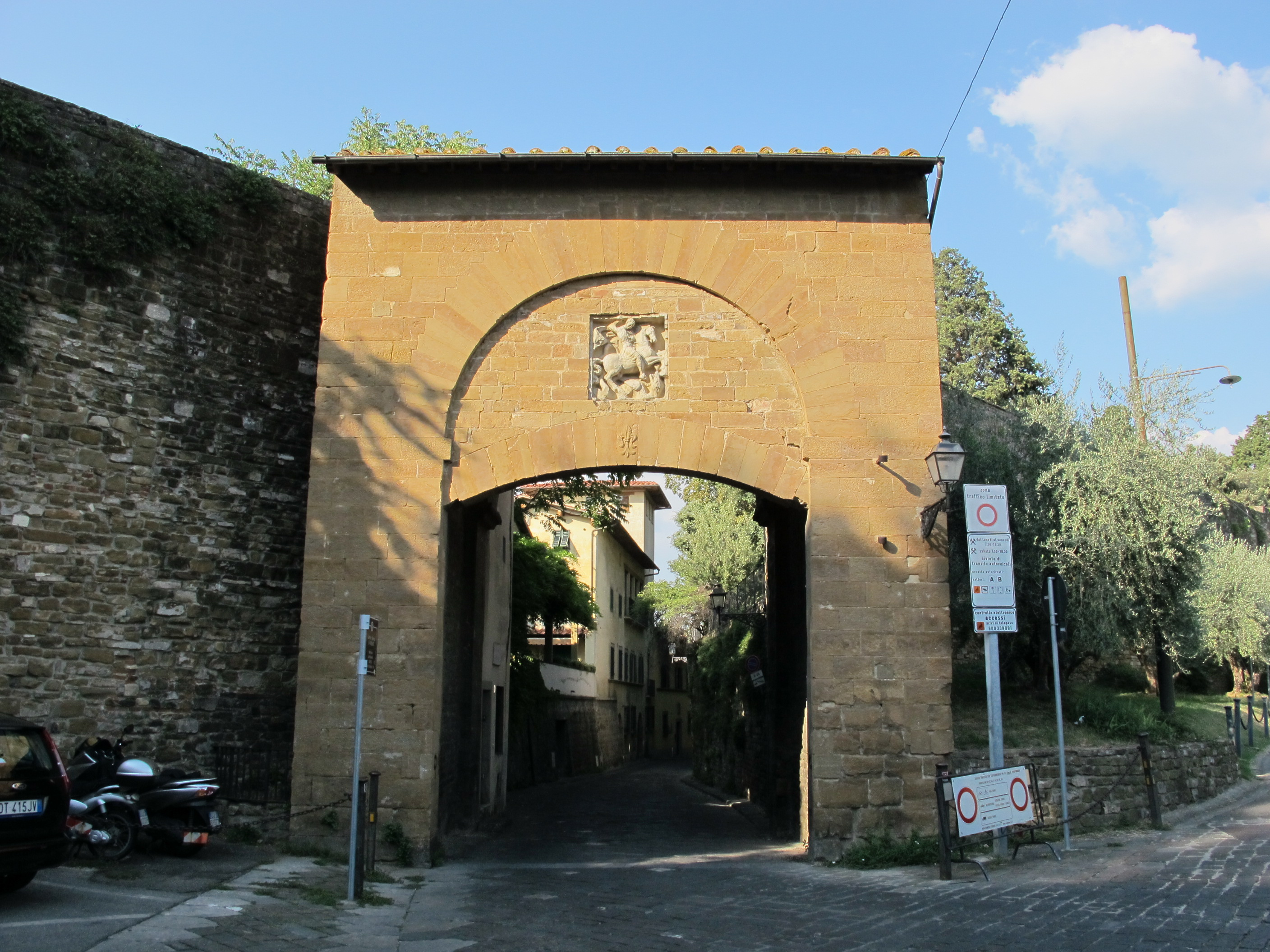 Porta san giorgio, esterno